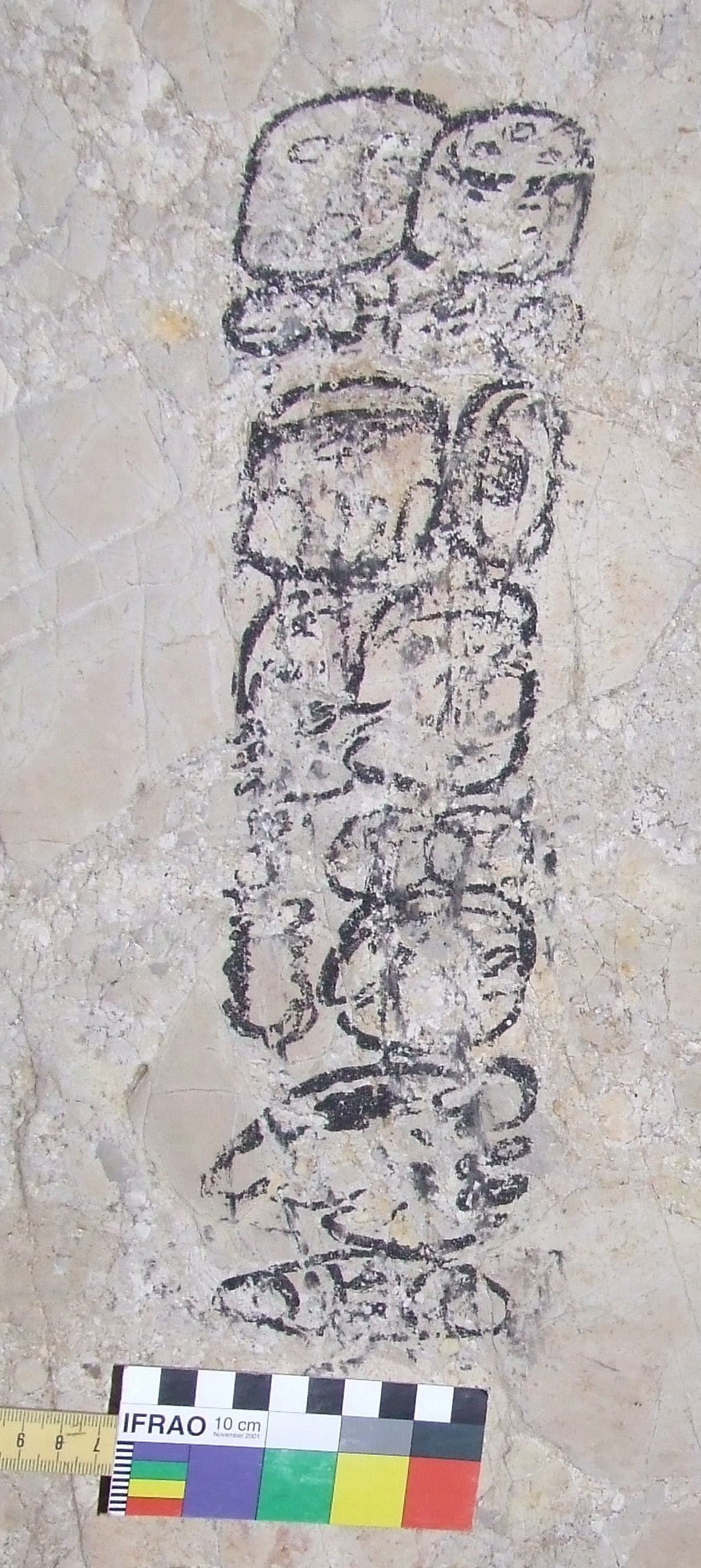 Pintura 30 de la Cueva de Naj Tunich, Guatemala